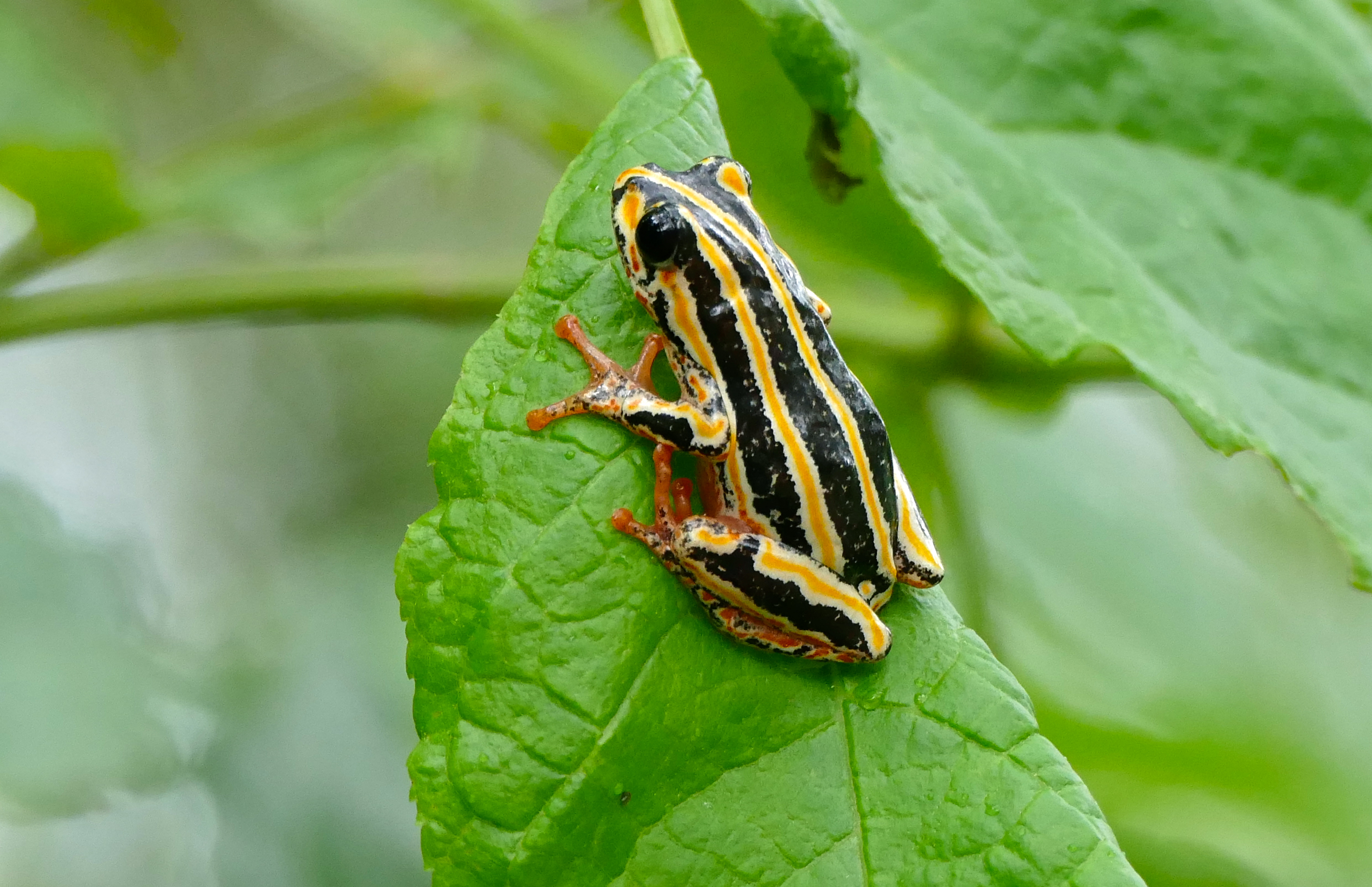 Skukuza Nursery, Skukuza, Kruger NP, SOUTH AFRICA